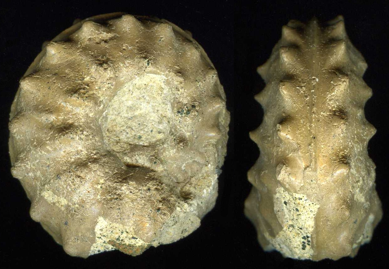 Schloenbachia varians, cenoman, Annopol (Polska)